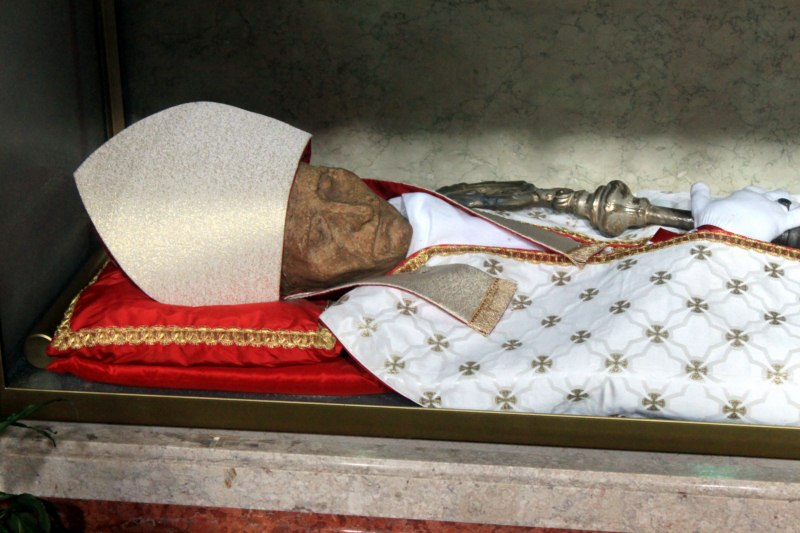 Le spoglie del beato Giordano Forzatè a San Benedetto Vecchio